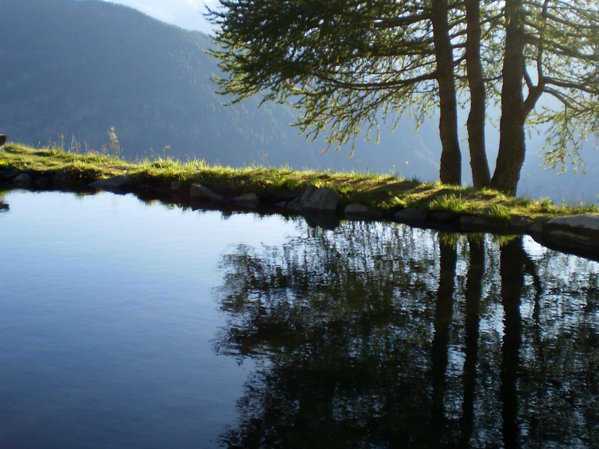 Stausee der Gsponeri (Suone)